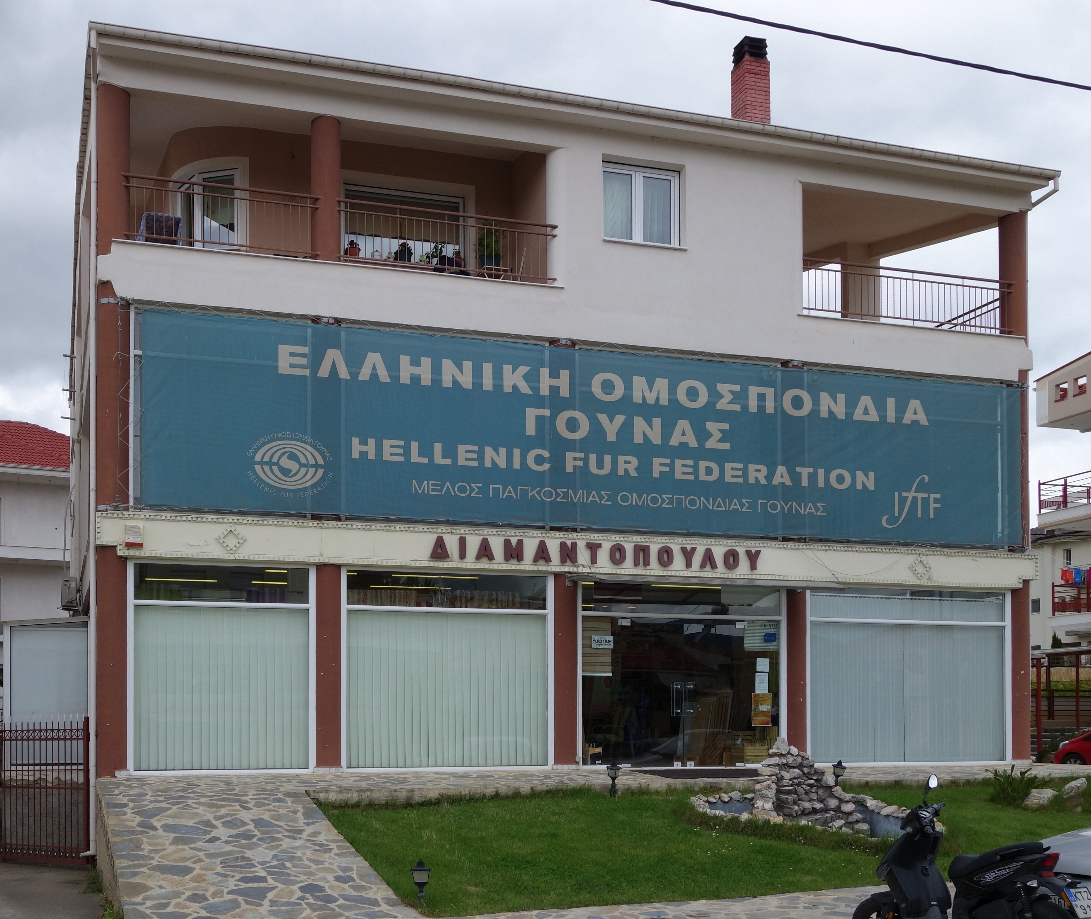 Kürschner in der Stadt Kastoria, Griechenland. Hellenic Fur Federation IFTF. Siehe auch Kürschner in der Präfektur Kastoria und Kürschner in der Stadt Siatista.